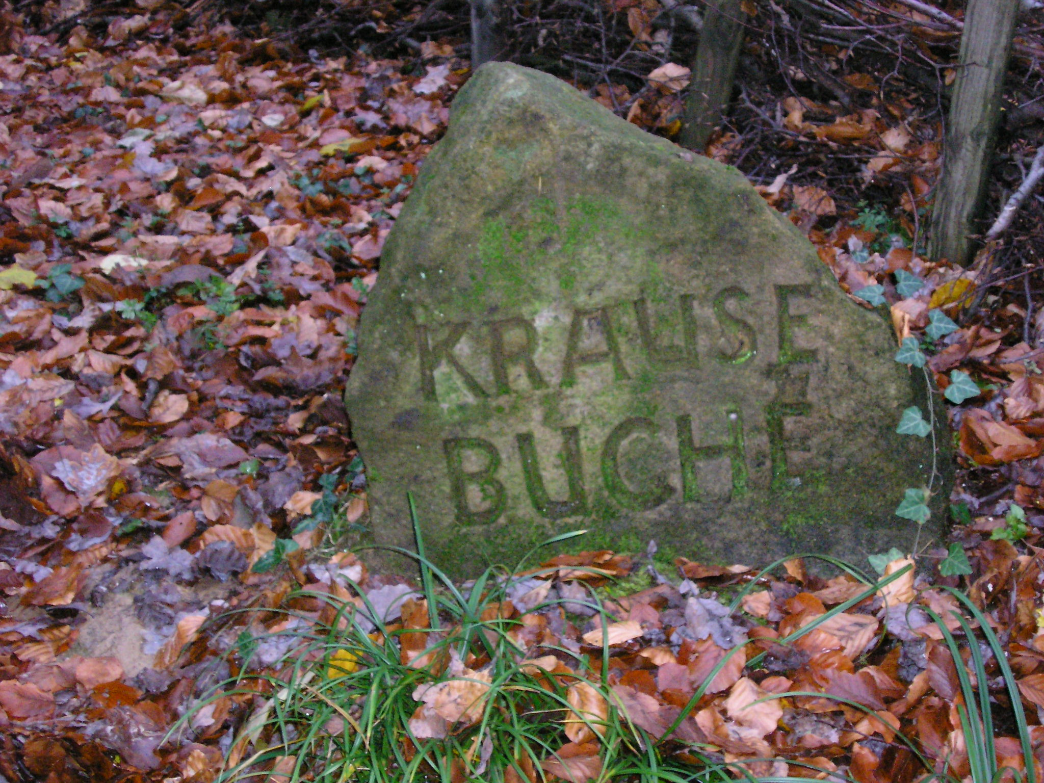 Stein mit dem Schriftzug Krause Buche